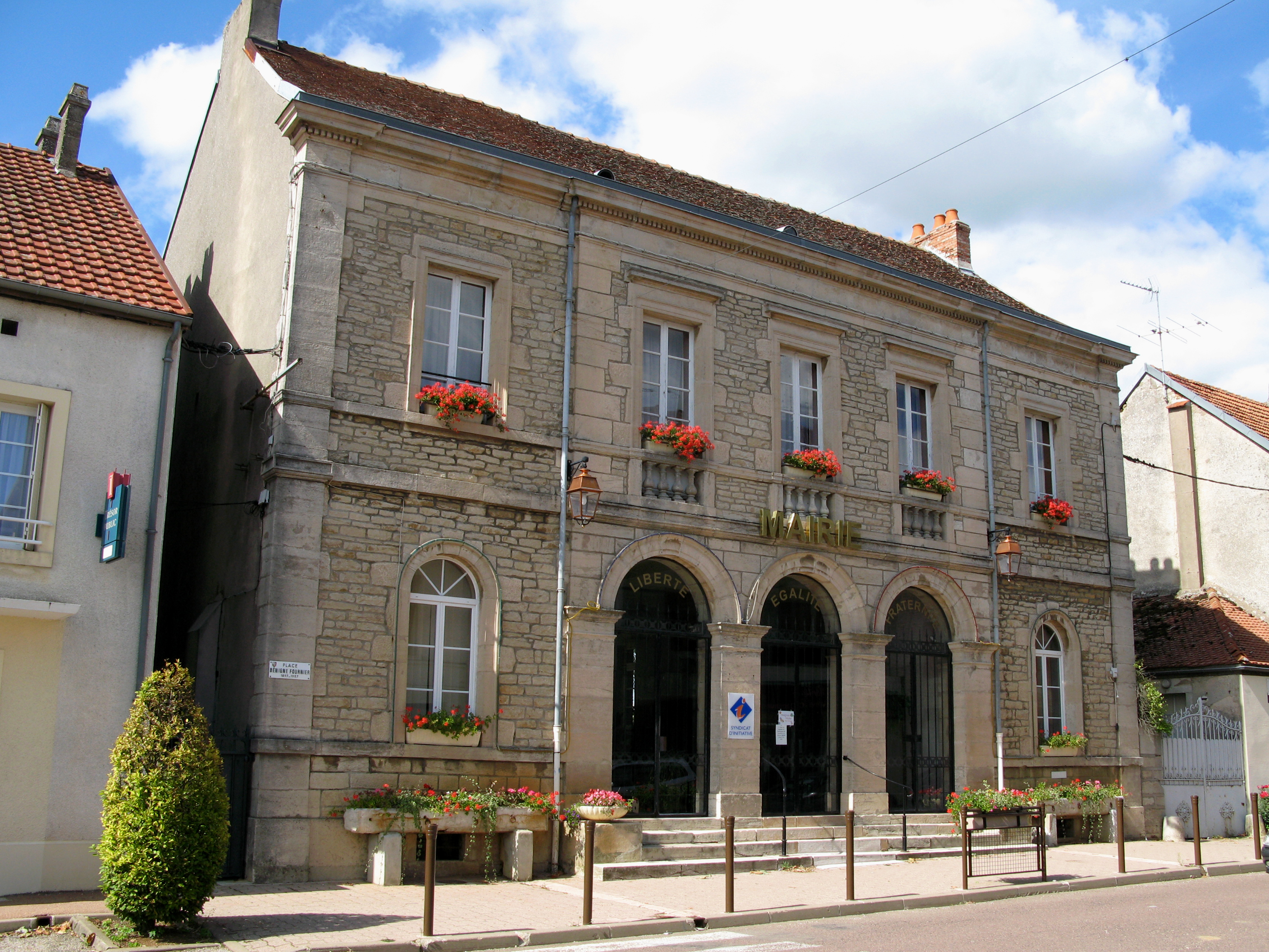 Sombernon (Côte-d'Or, France) - La mairie. .